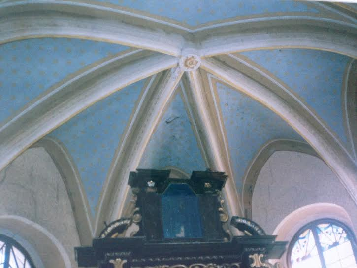 interier